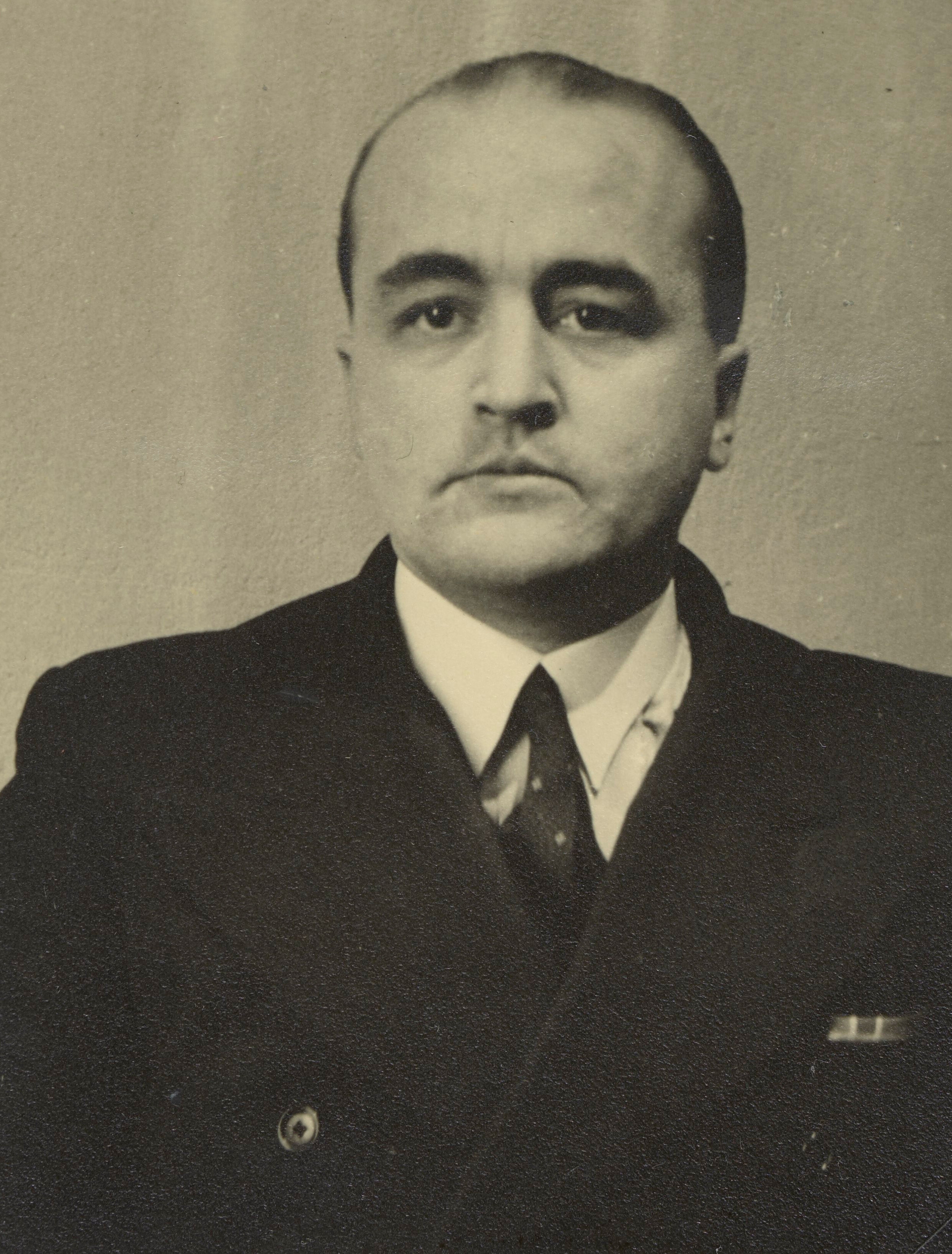 Leon Tuhan-Baranowsk, ok. 1937 r.